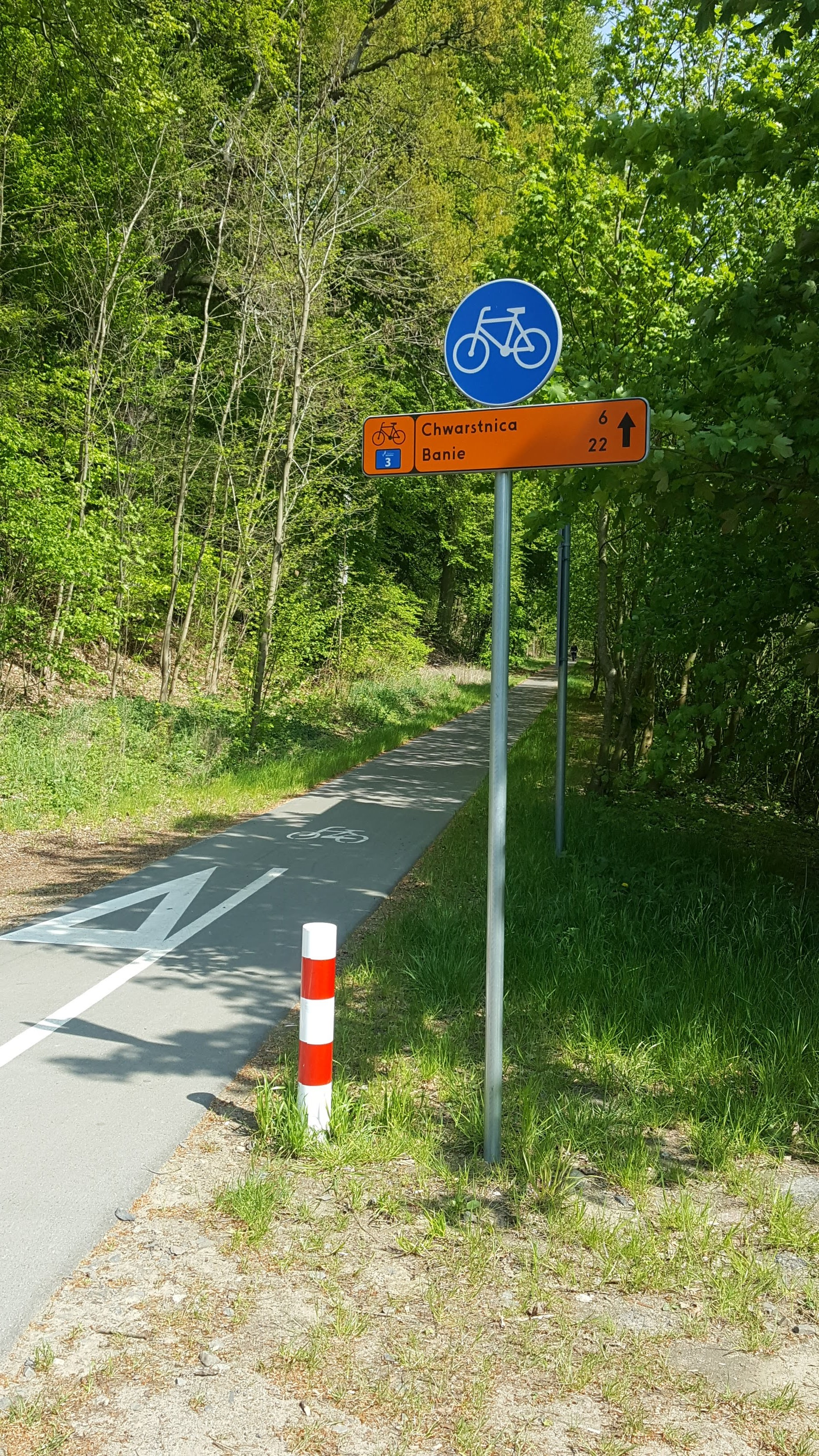 Blue Velo w Szczawnie przy Tywie